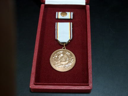 軍功労者メダル